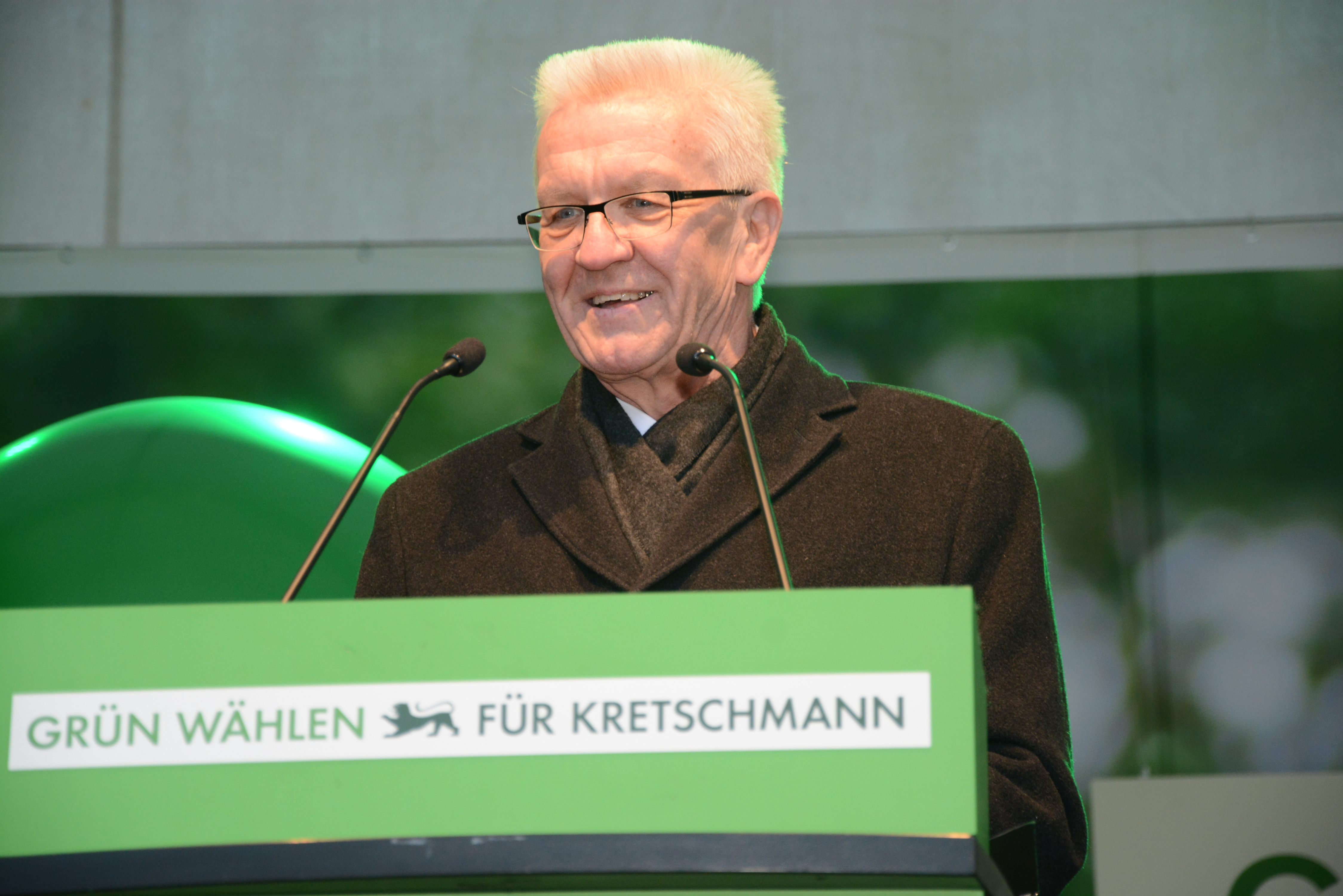 Winfried Kretschmann auf dem Wahlkampfhöhepunkt zur Landtagswahl 2016 in